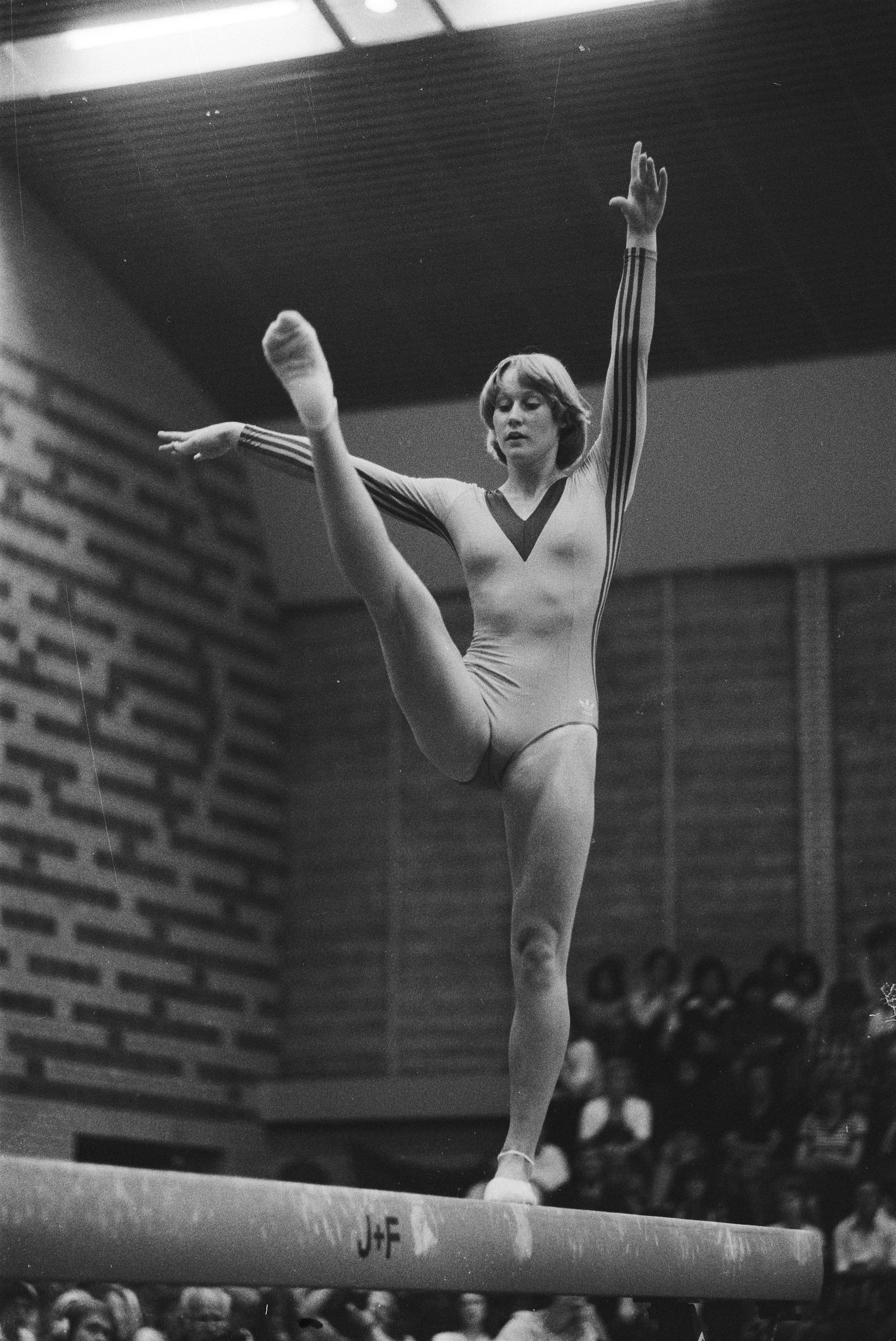 Collectie / Archief : Fotocollectie Anefo Reportage / Serie : [ onbekend ] Beschrijving : Turnen, Nederland tegen China; Monique Bolleboom in actie Datum : 19 augustus 1978 Locatie : Drachten Trefwoorden : evenwichtsbalk, sport, turnen Persoonsnaam : Bolleboom, Monique Fotograaf : Suyk, Koen / Anefo Auteursrechthebbende : Nationaal Archief Materiaalsoort : Negatief (zwart/wit) Nummer archiefinventaris : bekijk toegang 2.24.01.05 Bestanddeelnummer : 929-8630